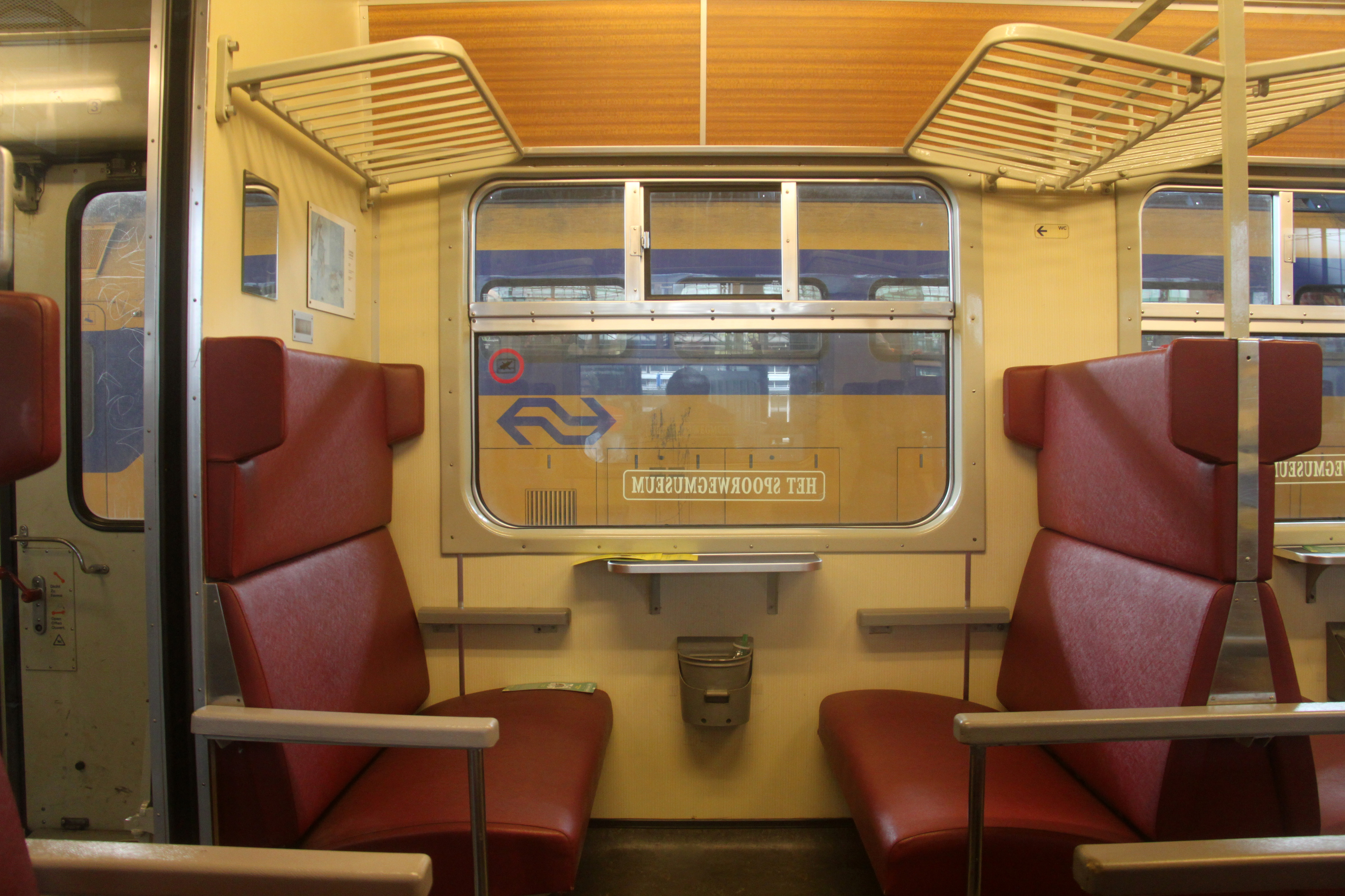 Zicht op het interieur van een rijtuig van Plan W van het Nederlands Spoorwegmuseum.